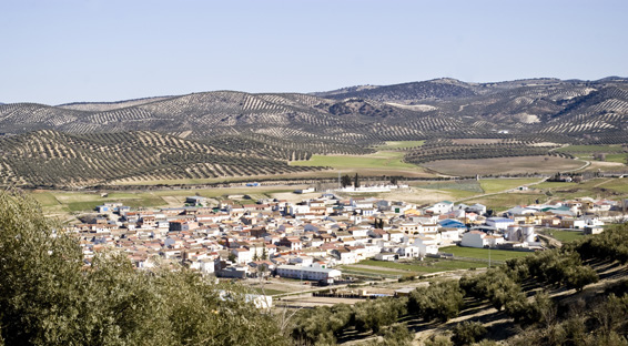 Campotéjar